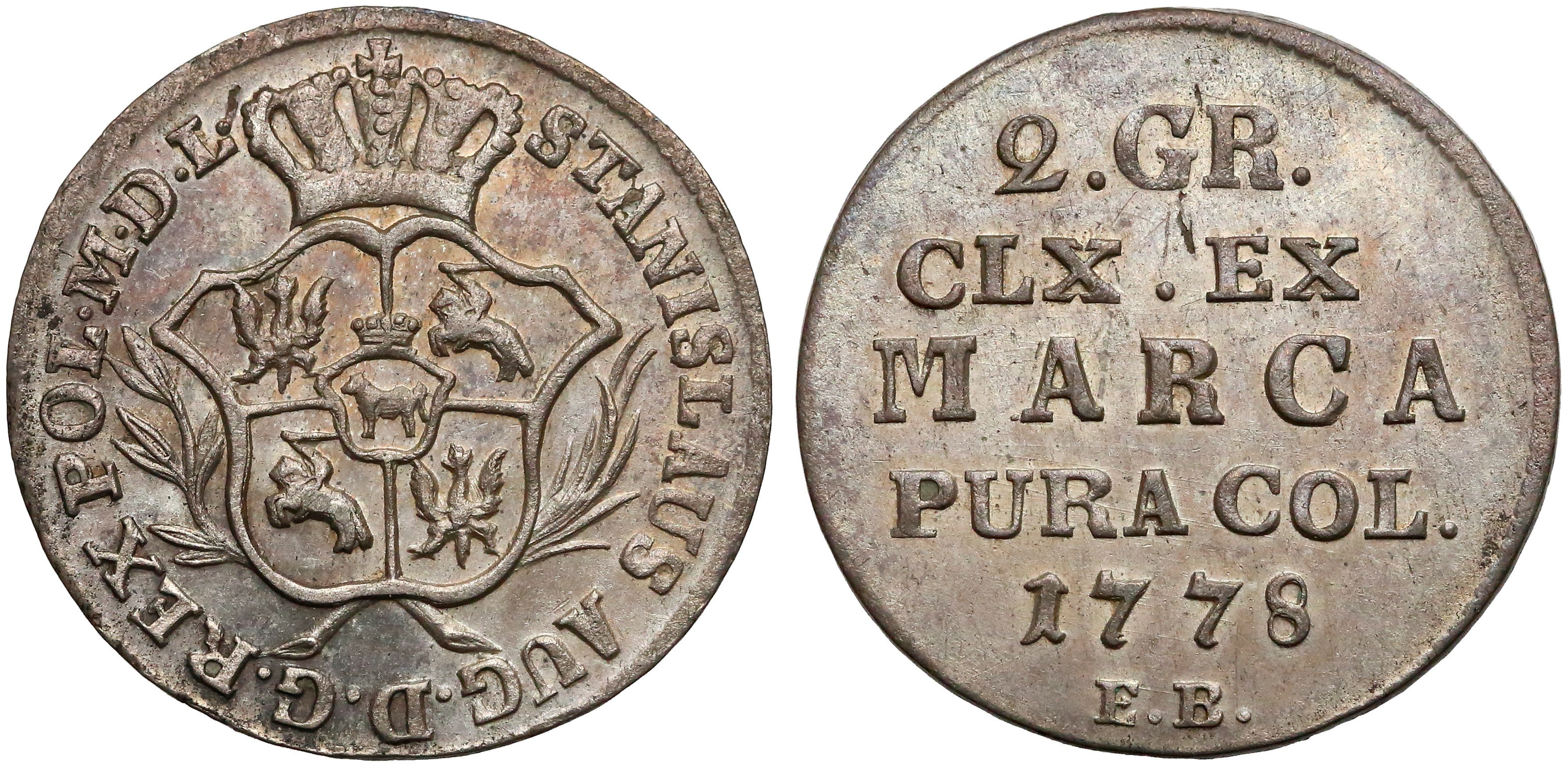 Półzłotek koronny 1778